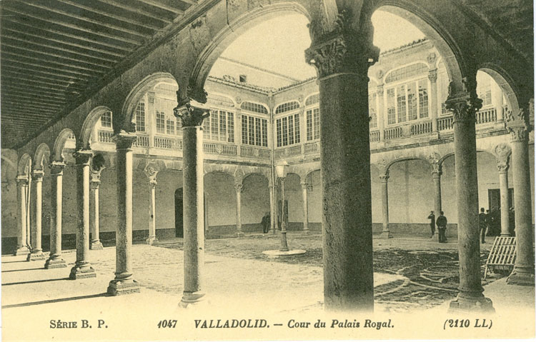 Palacio Real. Patio - Valladolid - Foto estereoscópica - Postal Color